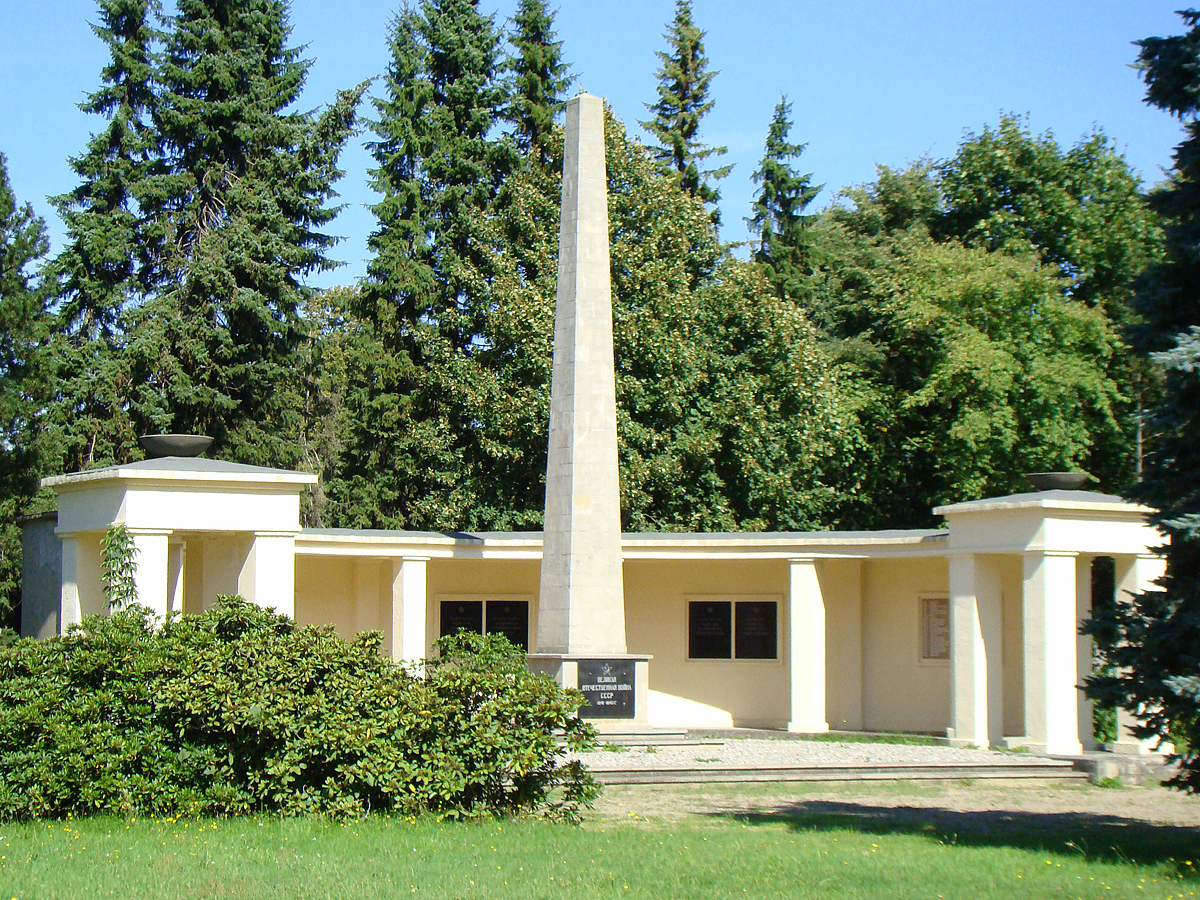 Sowjetischer Friedhof in Güstrow